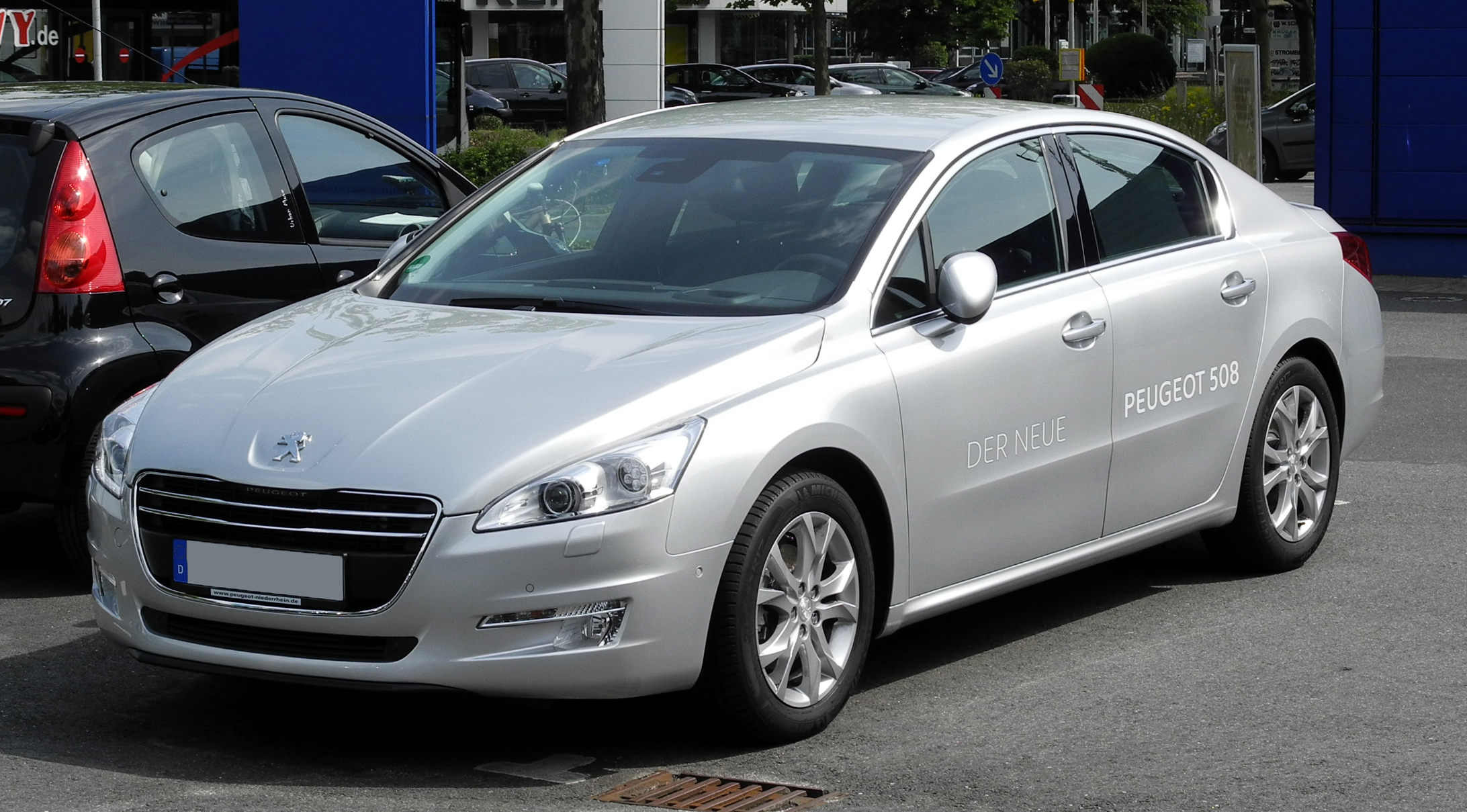 Peugeot 508